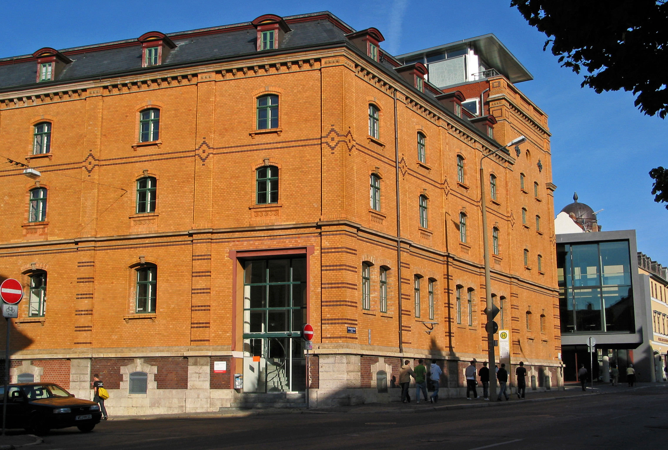 1875 als Brauereigebäude errichtet. Nach starken Zerstörungen 1888 und 1945 jeweils wieder aufgebaut. 1953 in Volkseigentum überführt und für die Limonadenabfüllung umgenutzt. 1989 von Coca-Cola übernommen, die den Bau 1991 an einen Investor übergibt. Seit 1993 wird der Bau von der Fakultät Gestaltung der Bauhaus-Universität Weimar genutzt.